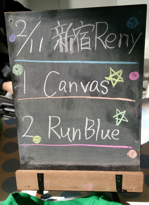 amiinaセトリボード(20150211(1))